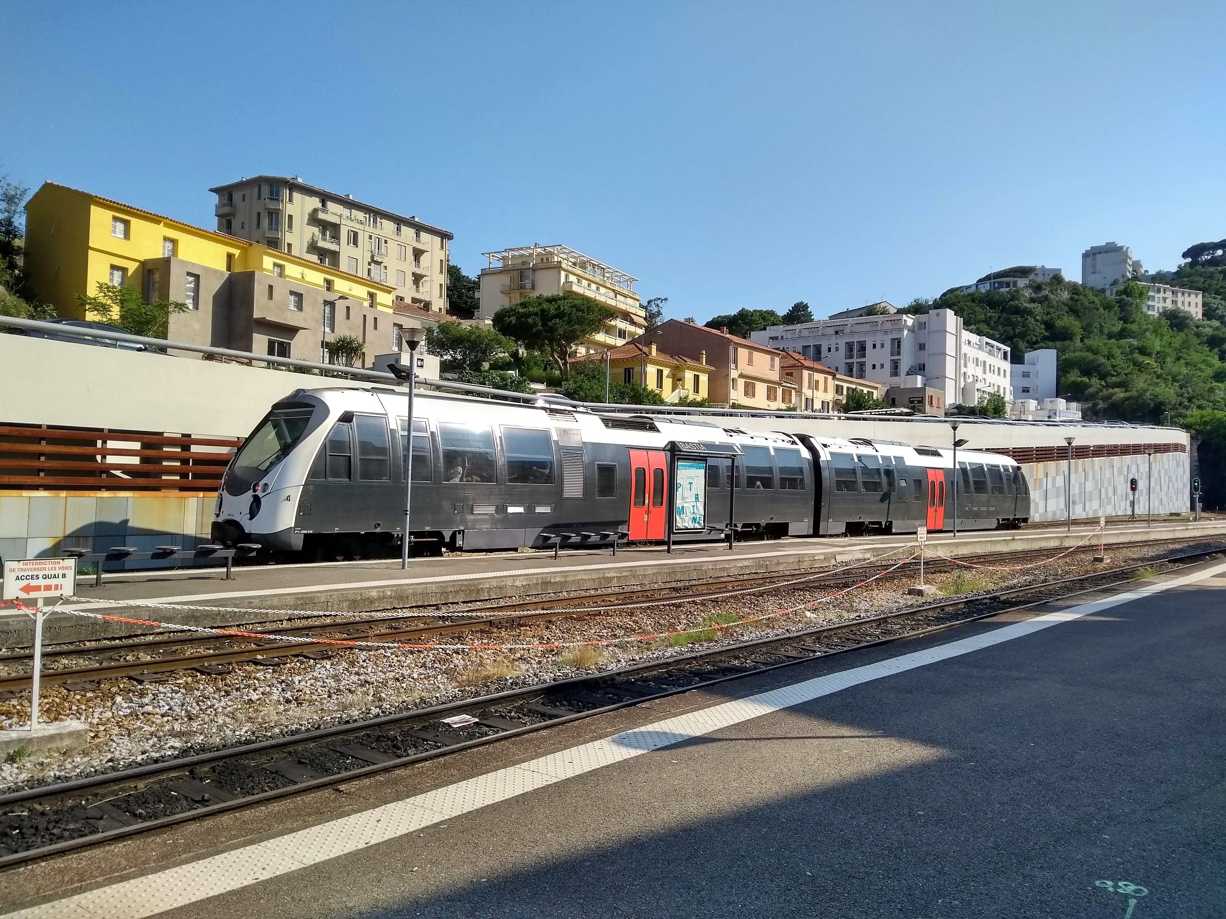 La gare de Bastia est une gare ferroviaire française, terminus de la ligne de Bastia à Ajaccio (voie unique à écartement métrique), située au centre-ville de Bastia.